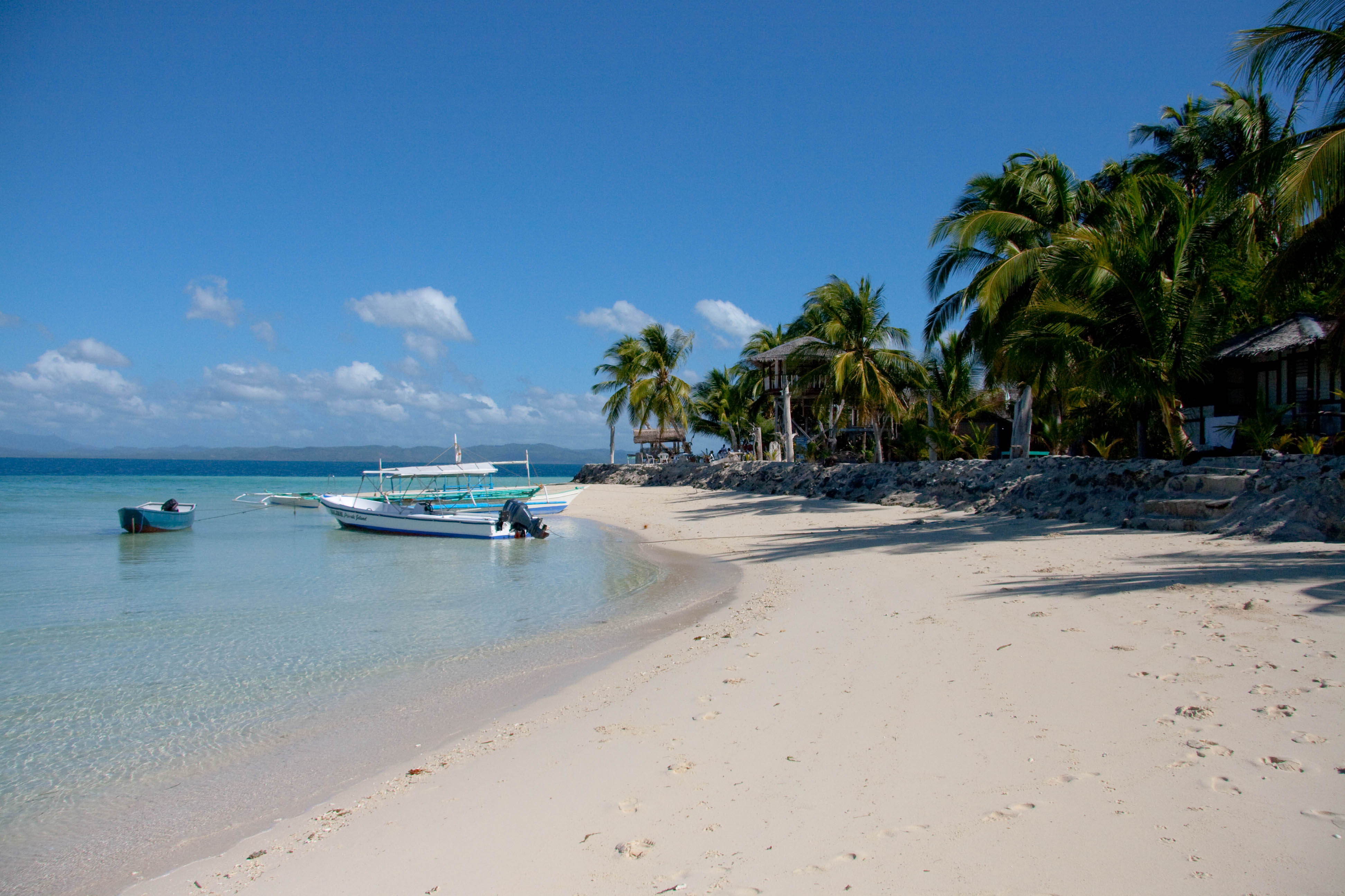 Coco Loco Island, Roxas, Palawan, Philippines